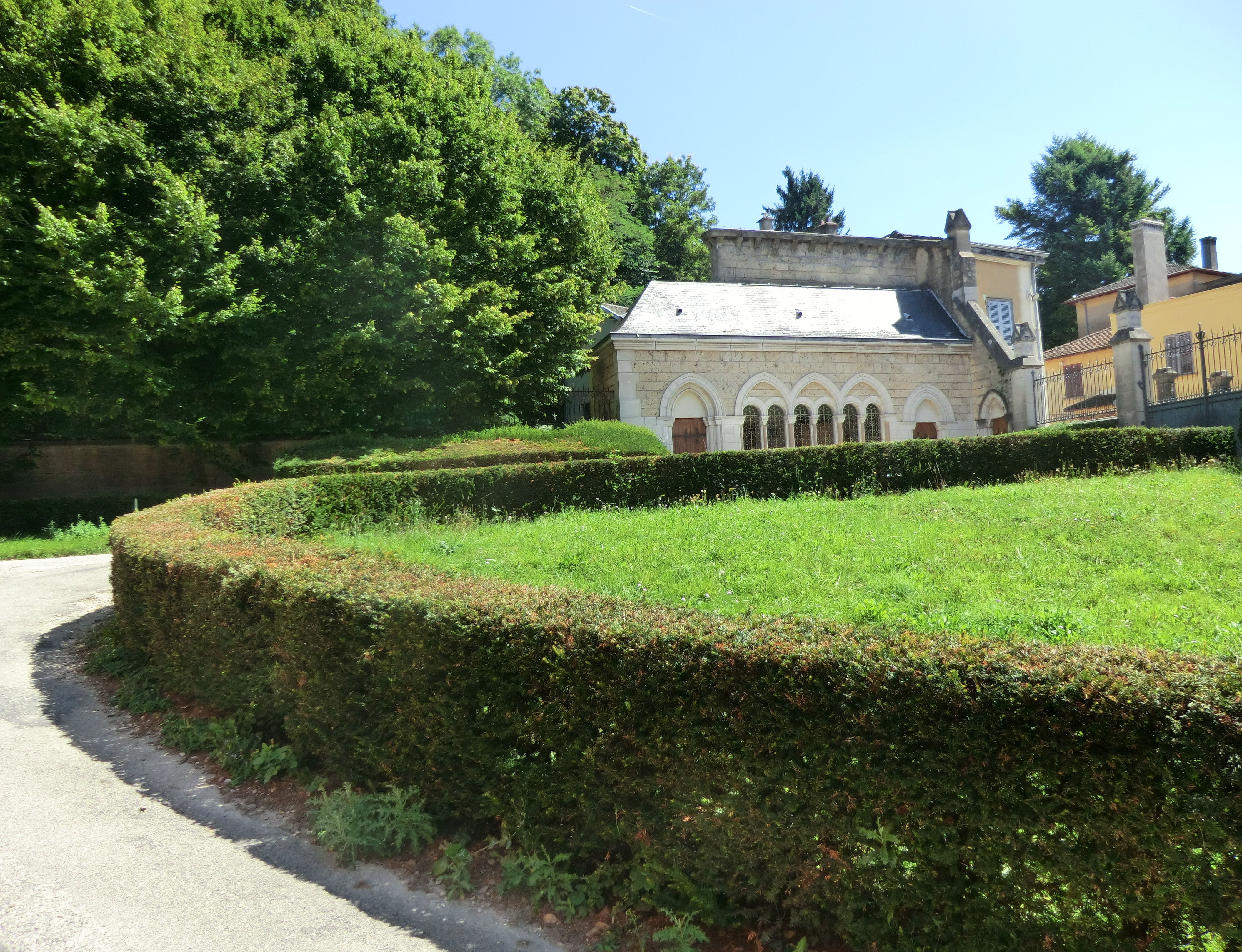 Château de Loyes.